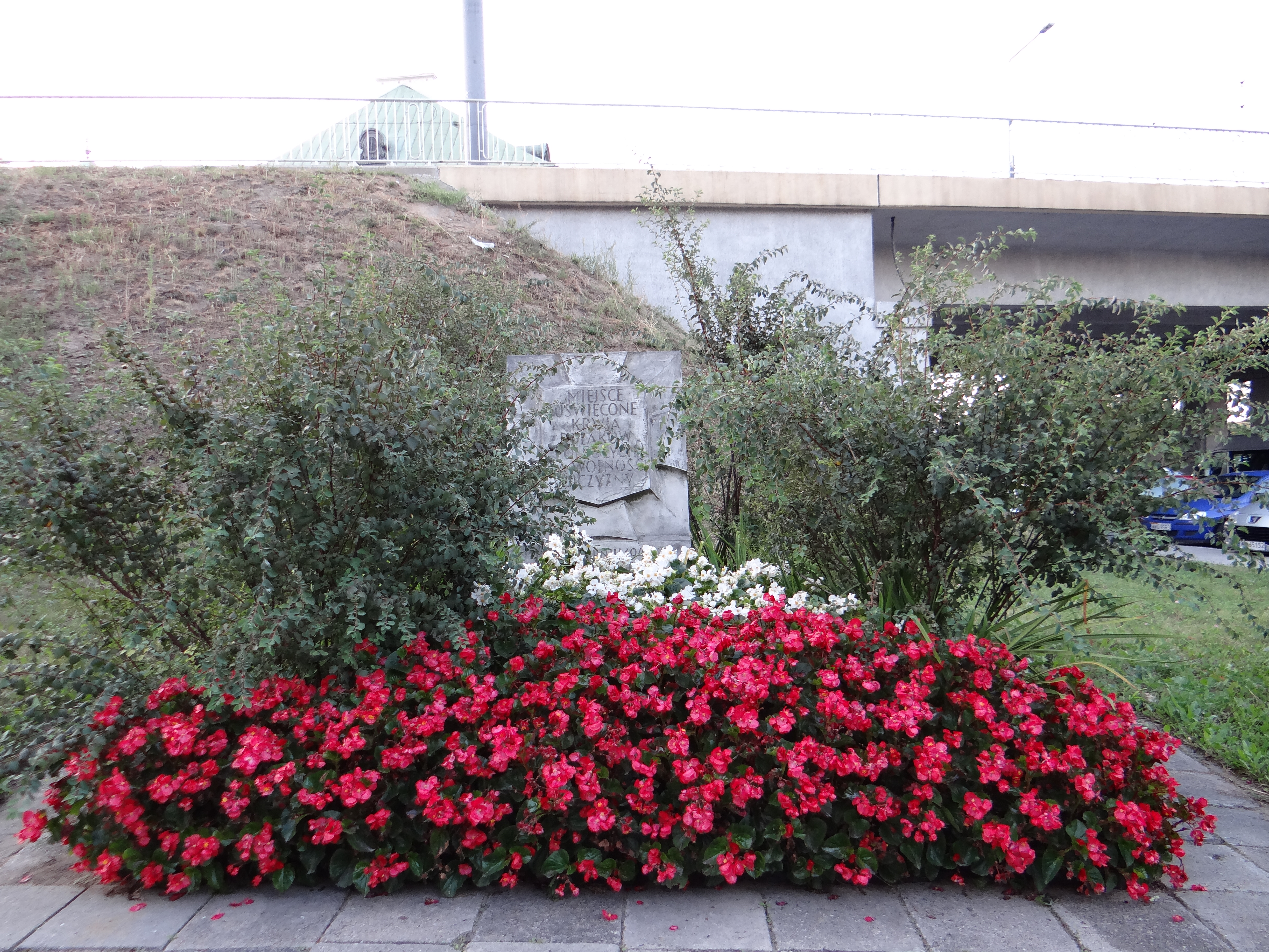 Miejsce Pamięci Narodowej przy ul Nowy Zjazd w Warszawie